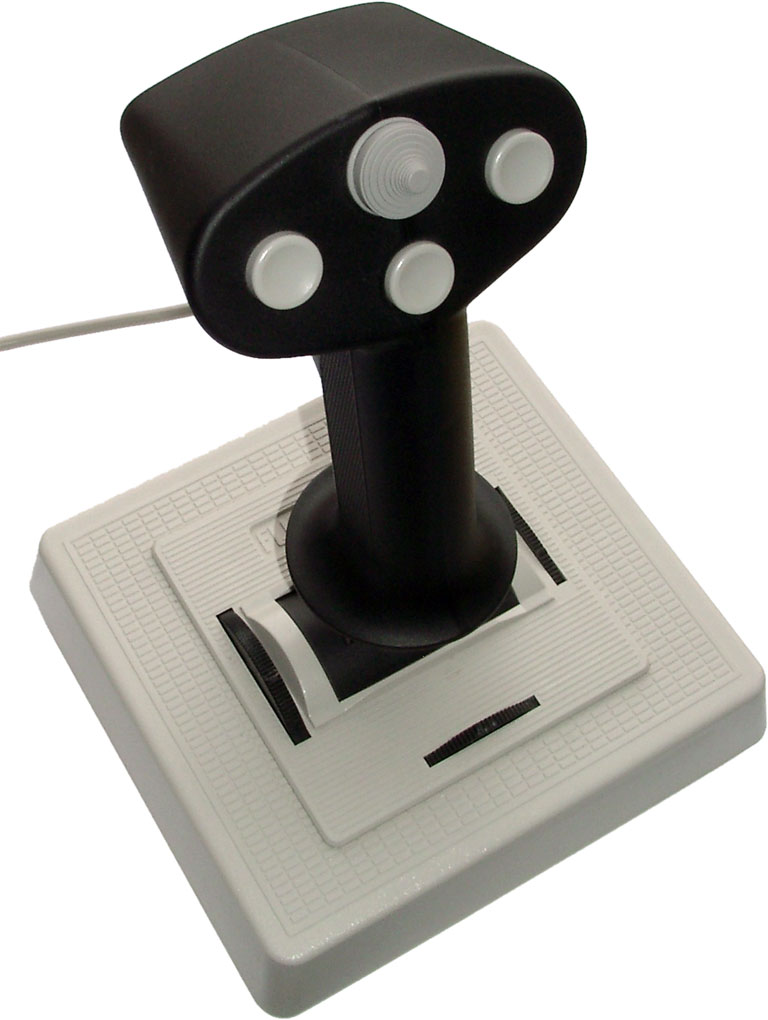 Motiv: Joystick, Modell Flightstick Pro der Firma CH Products. Der Joystick wird über die ADB-Schnittstelle (Apple Desktop Bus) am Computer angeschlossen. Fotograf: KMJ Aufnahmedatum: 2004-06-26 Aufnahmeort: Studio Bildname: Joystick_01_KMJ.jpg Bildgröße: 768 Pixel x 1.020 Pixel (77.209 Bytes) Stichworte: EDV, Eingabegerät, Joystick, Steuerung, Flugsimulator, Spielen, ADB